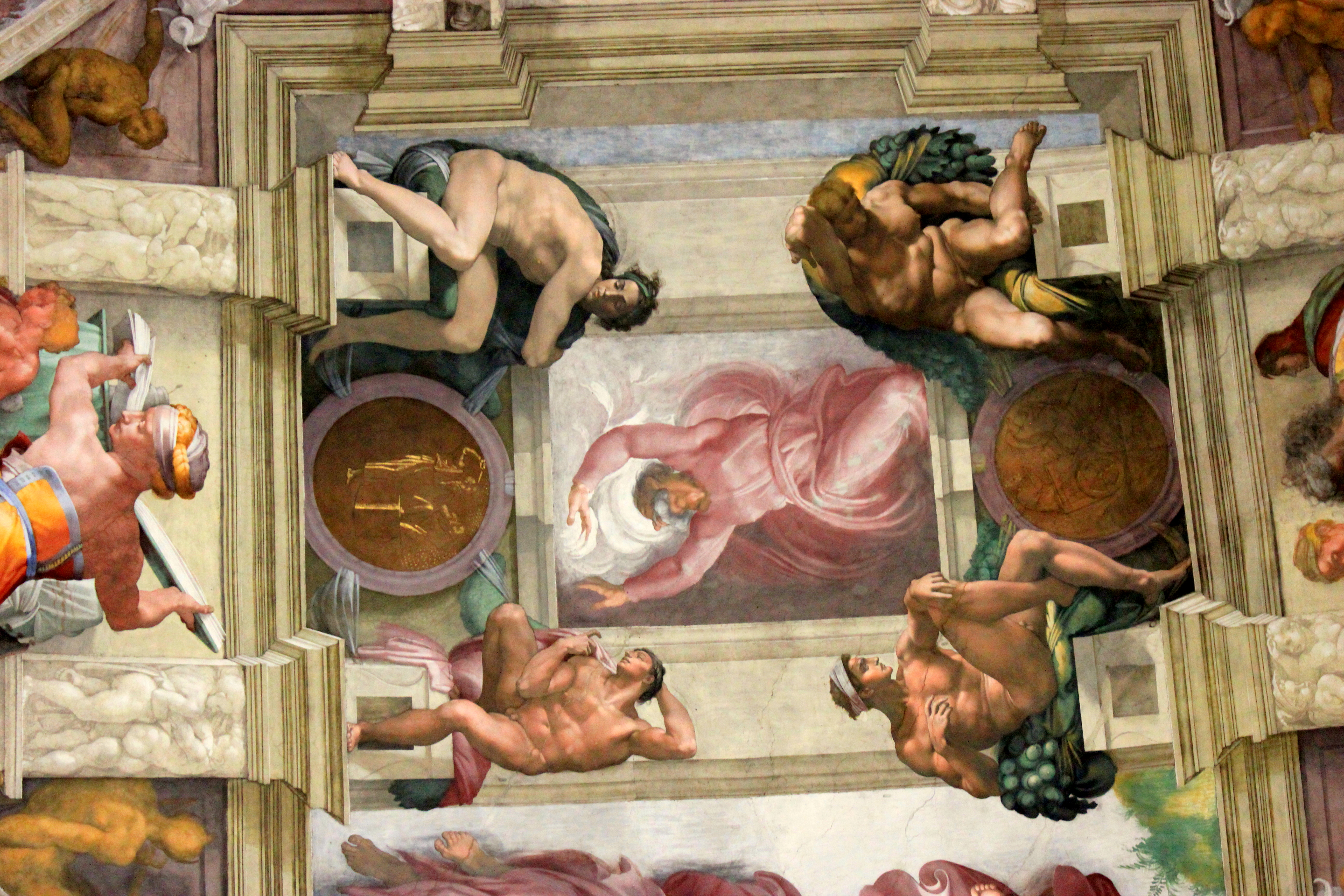 La Separación de la Luz de la Oscuridad